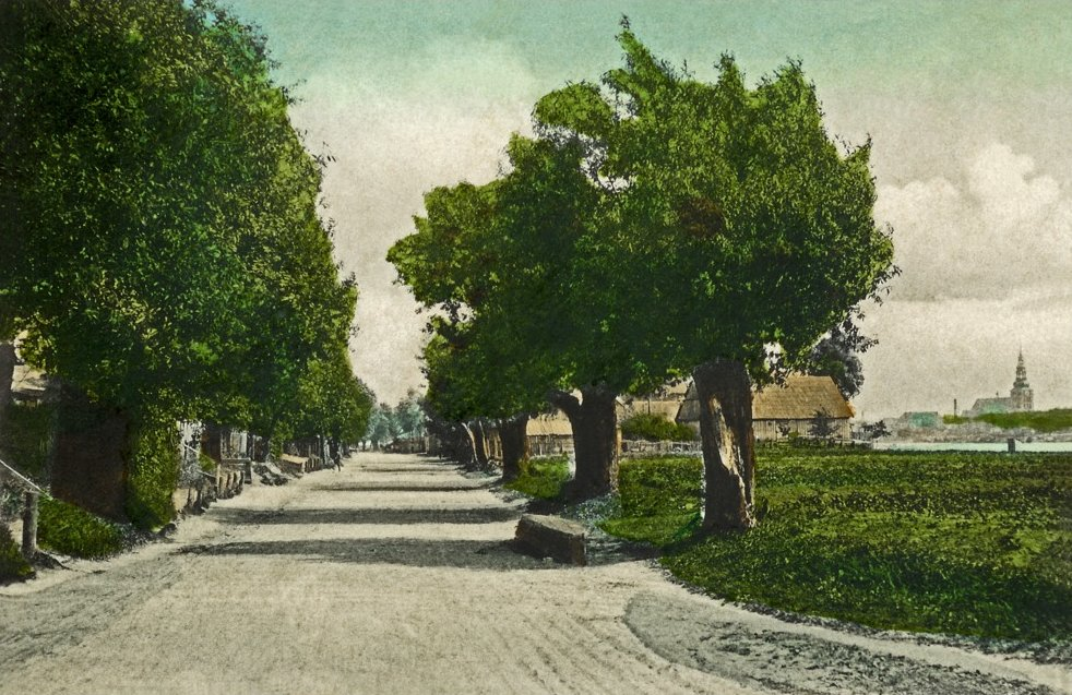 Фотография с видом на одну из главных улиц правобережной части города Тильзит (ныне город Панямуне).